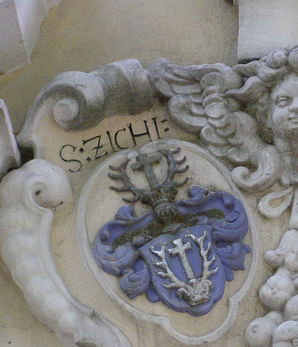 Rusovce - erb Zichyovcov nad portálom farského kostola sv. Márie Magdalény